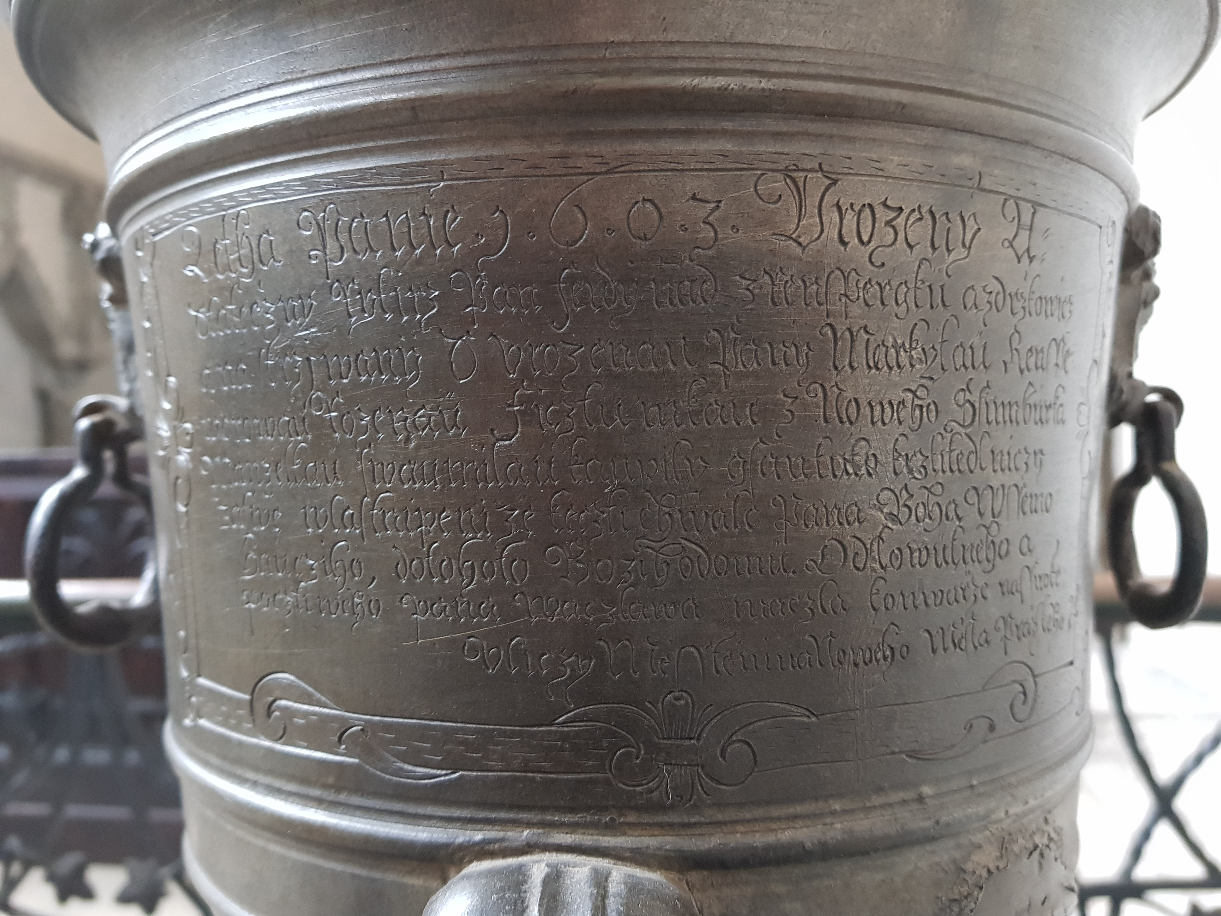 Křtitelnice v hradní kapli Korunování Panny Marie na Křivoklatě, detail: nápis na zadní straně